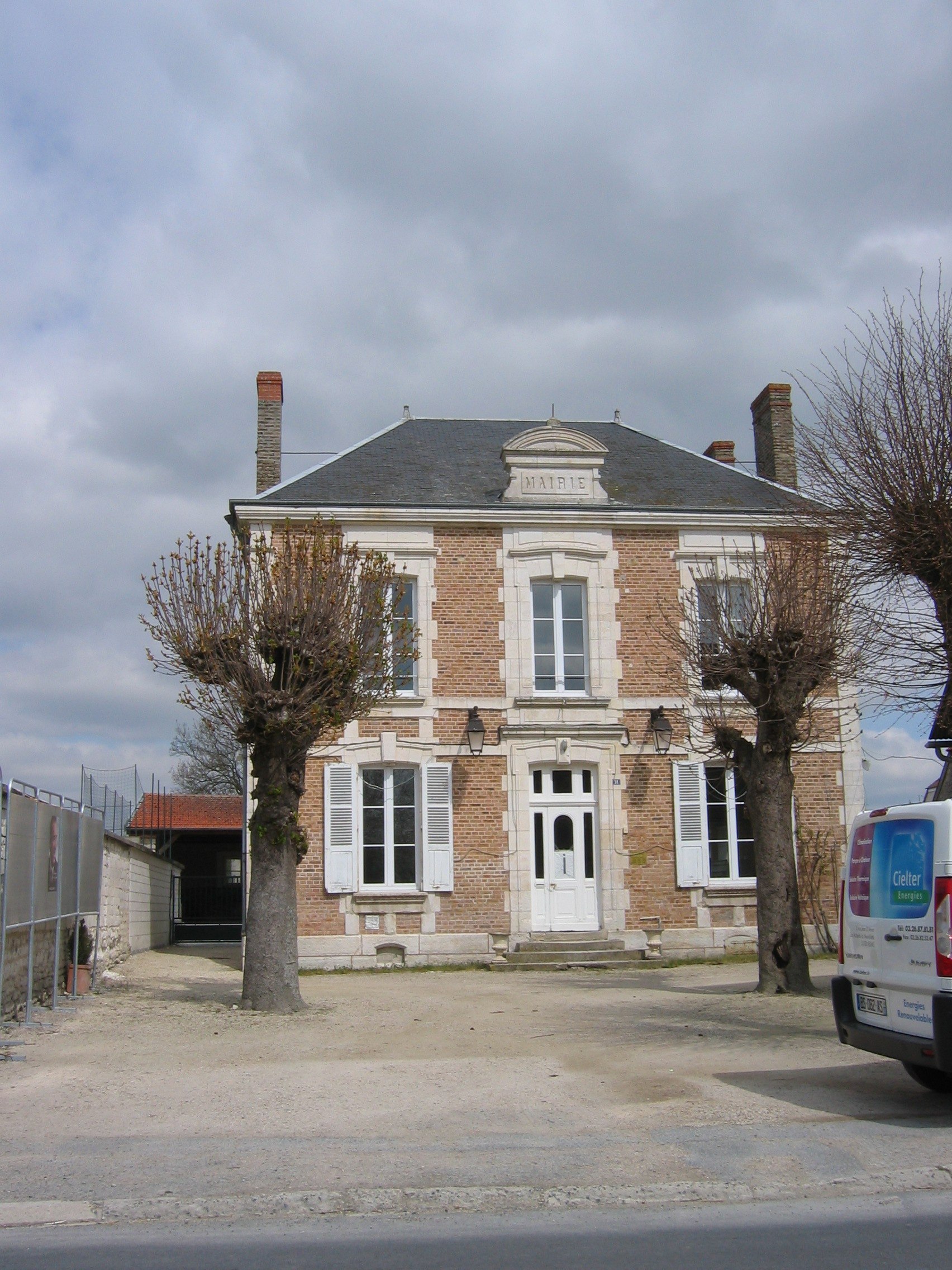 Mairie de Brienne sur Aisne - Ardennes - France